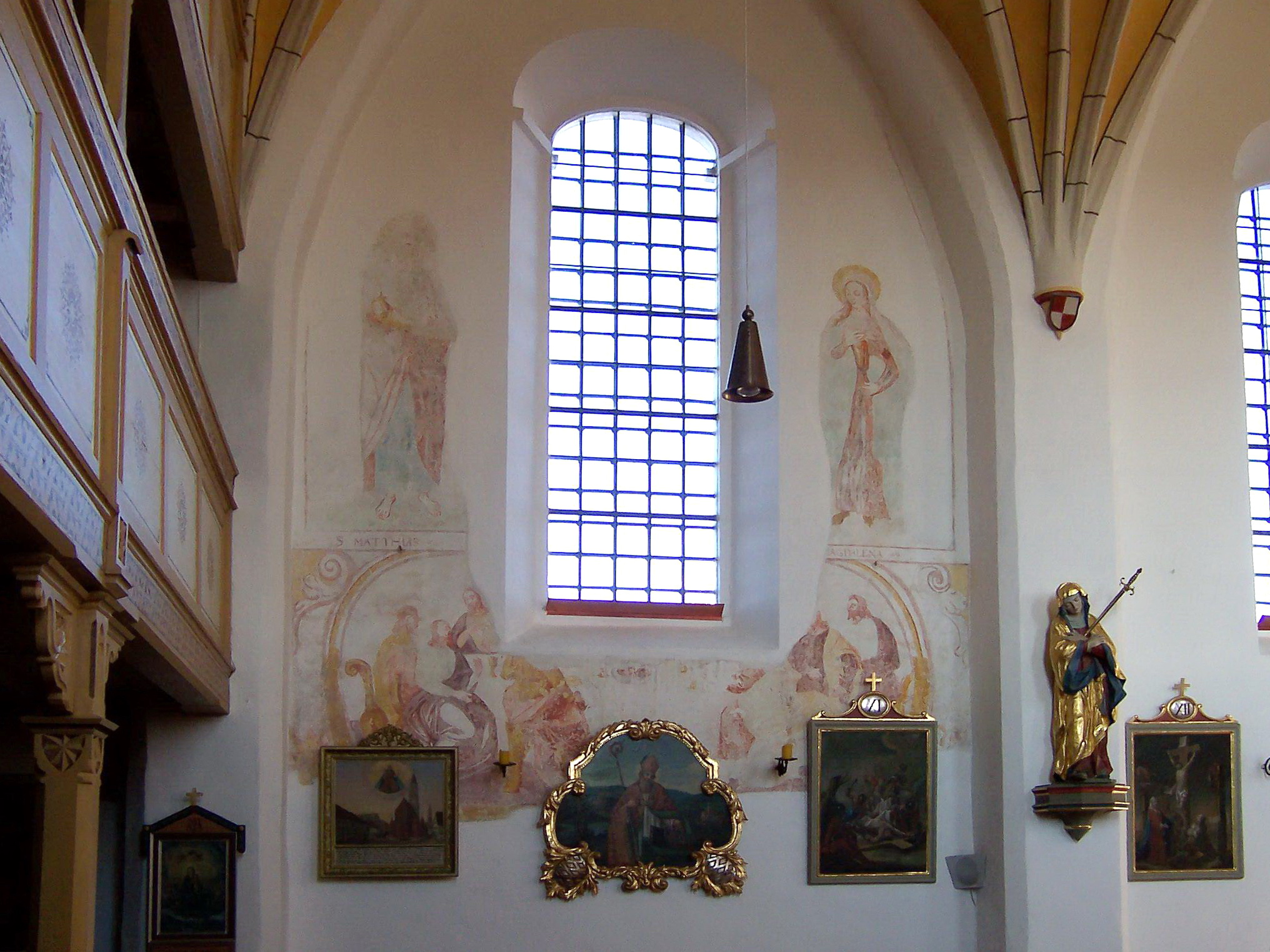 Landshut, Frauenberg 14. Katholische Kirche St. Mariä Heimsuchung. Einschiffiges Langhaus mit eingezogenem Chor und spätgotischen Netzrippengewölben. Freigelegte Fresken aus der Mitte des 15. Jahrhunderts im Langhaus.